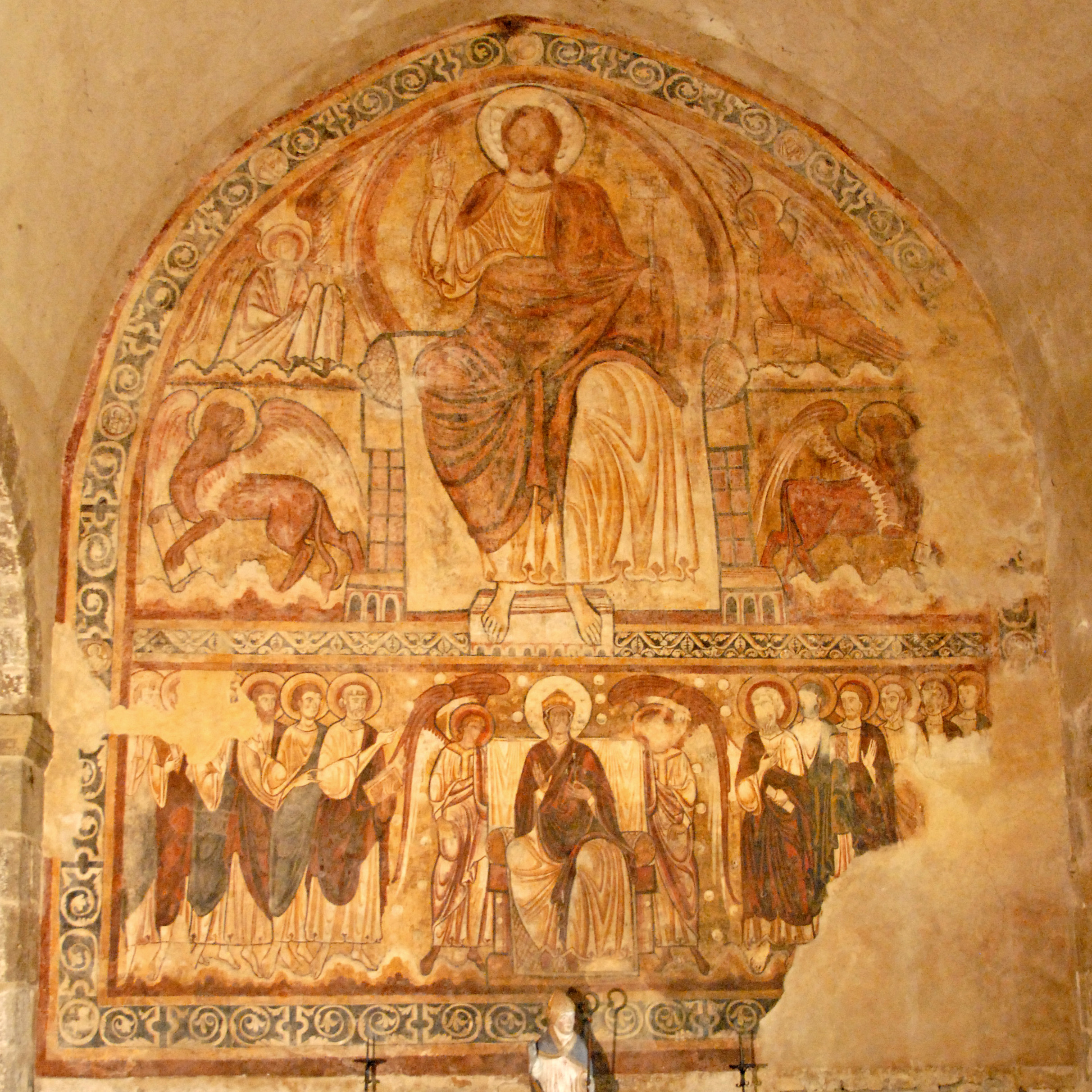 Abtei St.-André Lavaudieu, Refektorium, Fresko gesamt